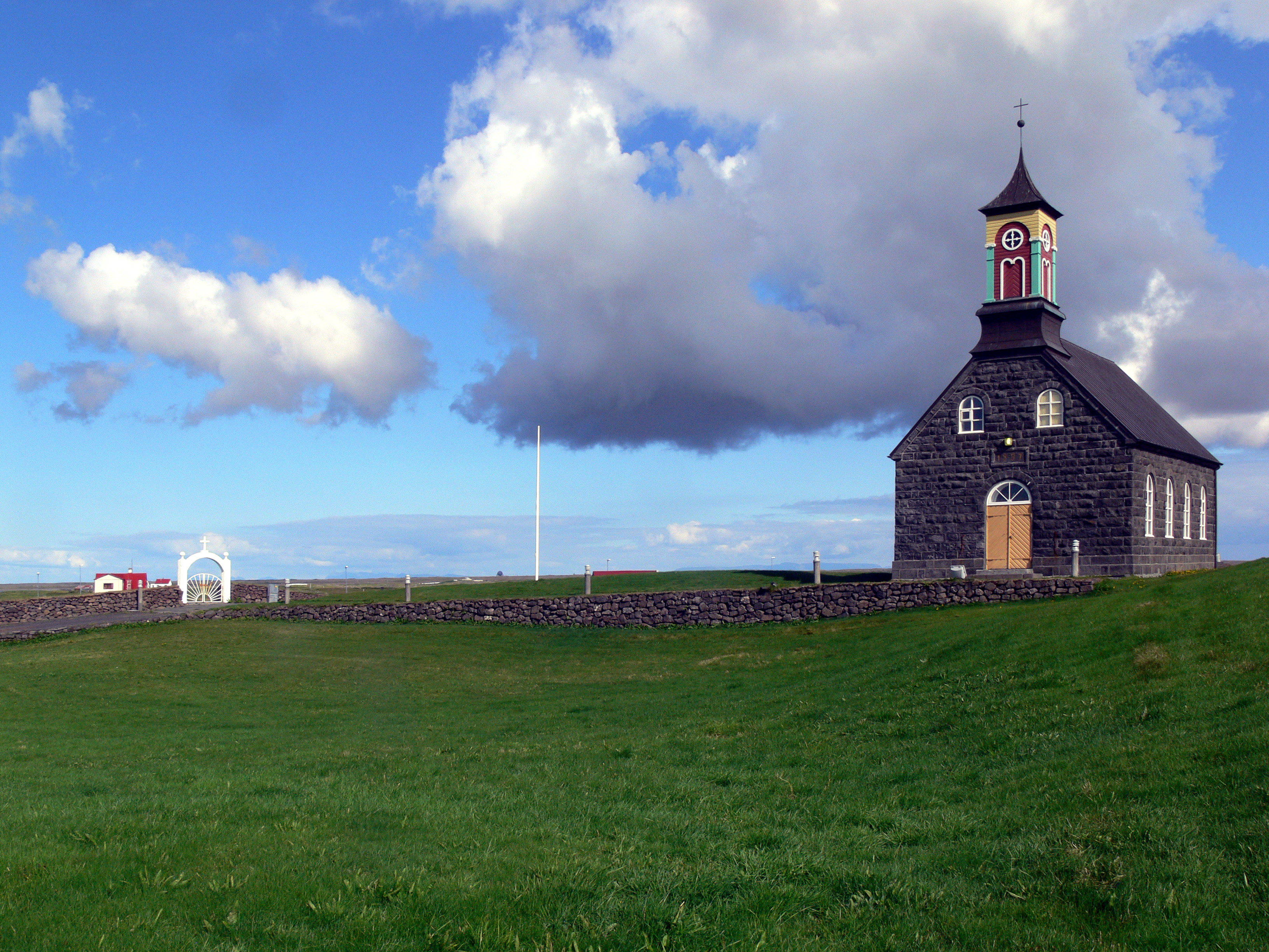 Kirche in Hvalsnes auf Reykjanes in Südisland